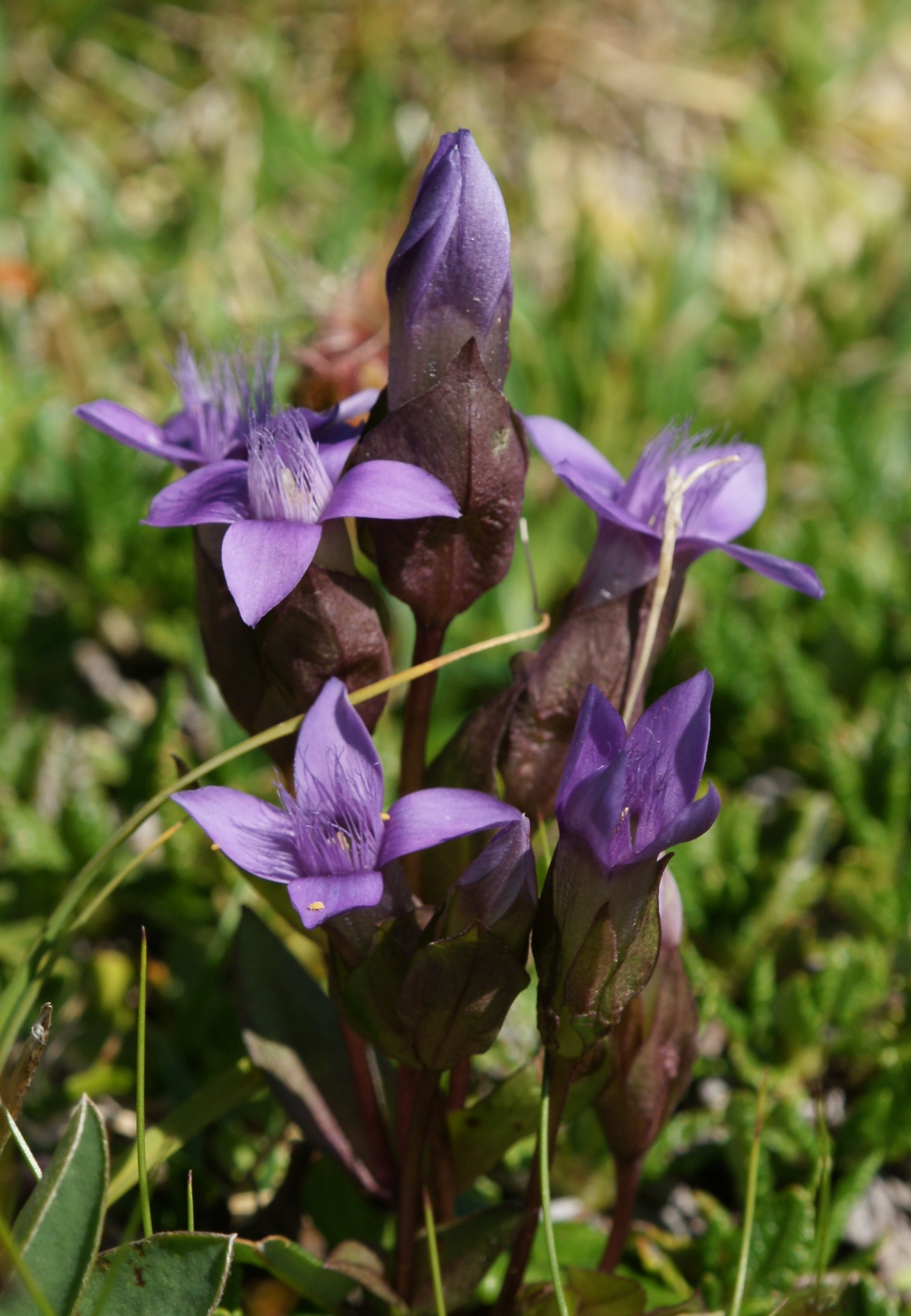 Die Kranzenziane Gentianella campestris bilden eine eigene Gattung innerhalb der Enziangewächse (Gentianaceae). Gesehen im Lechquellengebirge am Butzensee.